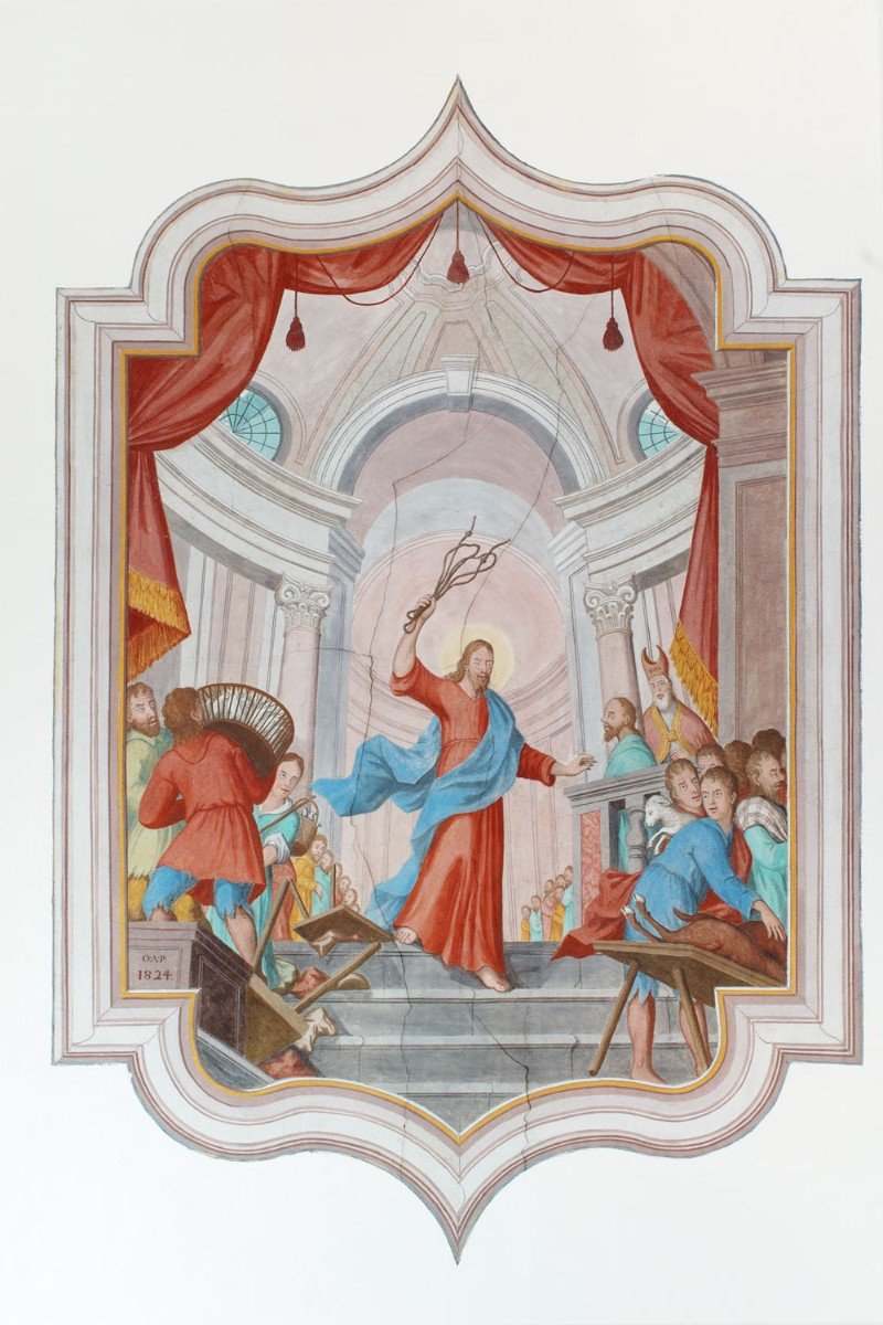 Tipologia dipinto murale Misure cm 350.0x200.0 (HxL) Datazione secolo XIX (1824) Autore Paghini Domenico, ambito friulano Materia e tecnica affresco Soggetto Gesù Cristo caccia i mercanti dal tempio